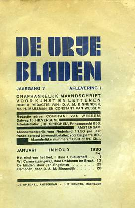 De Vrije Bladen, Onafhankelijk maandschrift voor kunst en letteren, aflevering 1, jaargang 7, januari 1930